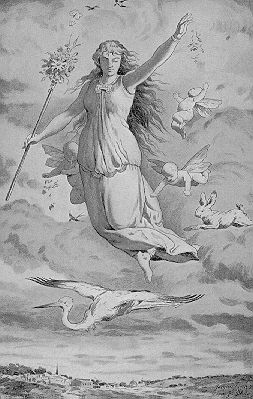 Ostara Das Bild stammt von: und ist dort unter Non-Copyrighted Images zur freien Verfügung gestellt (public domain, gemeinfrei).